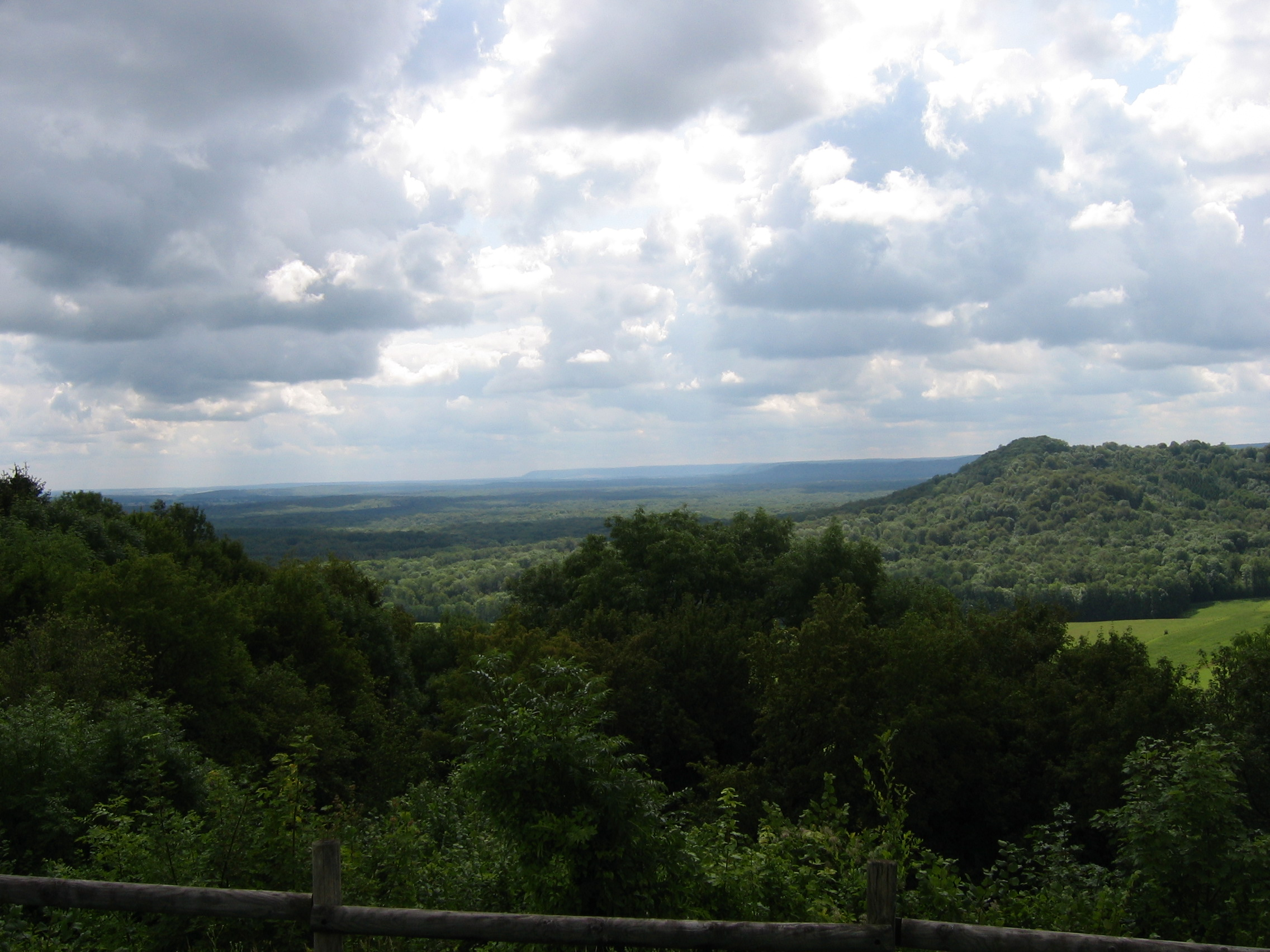 Vue en haut du Pain de Sucre ou butte de Stonne - village des Ardennes - France